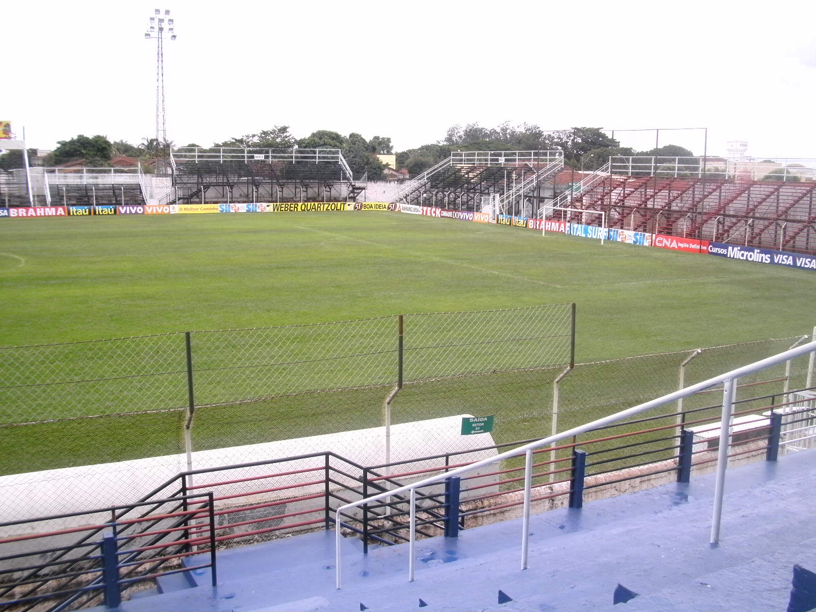 Patinhas esteve aqui - Estadio do Oeste - 5